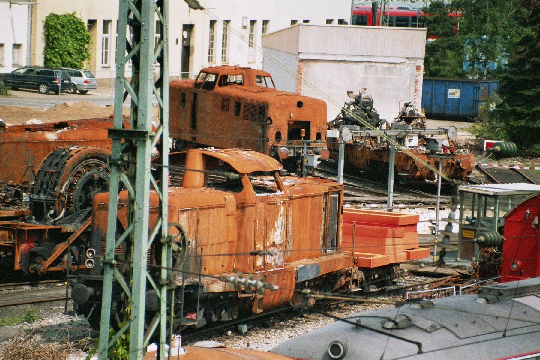 Überreste der ausgebrannten Loks im Lokschuppen Gostenhof. Vorne die ehemalige Hofer V 100 1023.